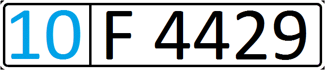 Автомобильный номерной знак физических лиц Узбекистана, стандарт 1996 года